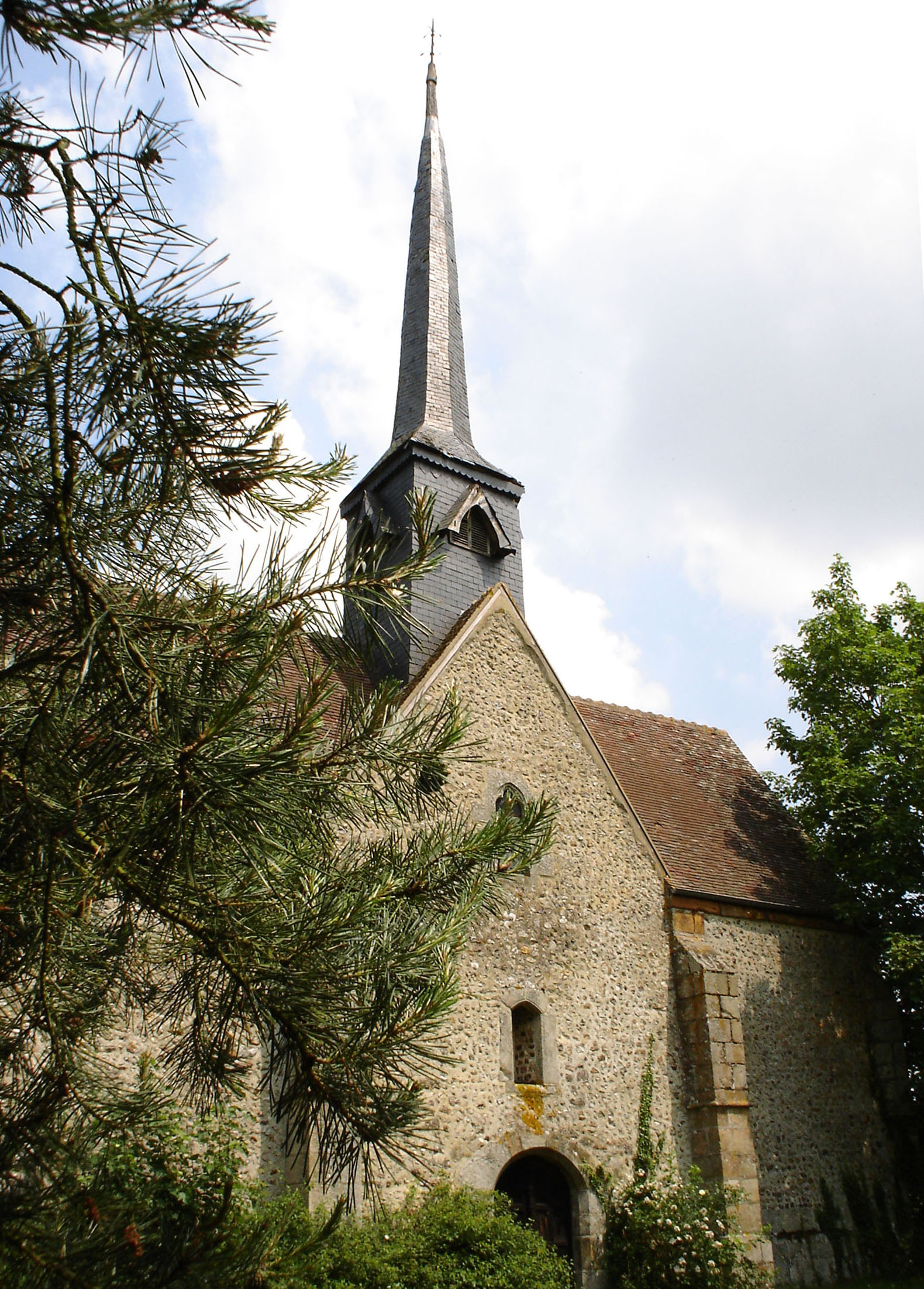 Église Saint-Gilles de Petiteville (Gournay-le-Guérin).